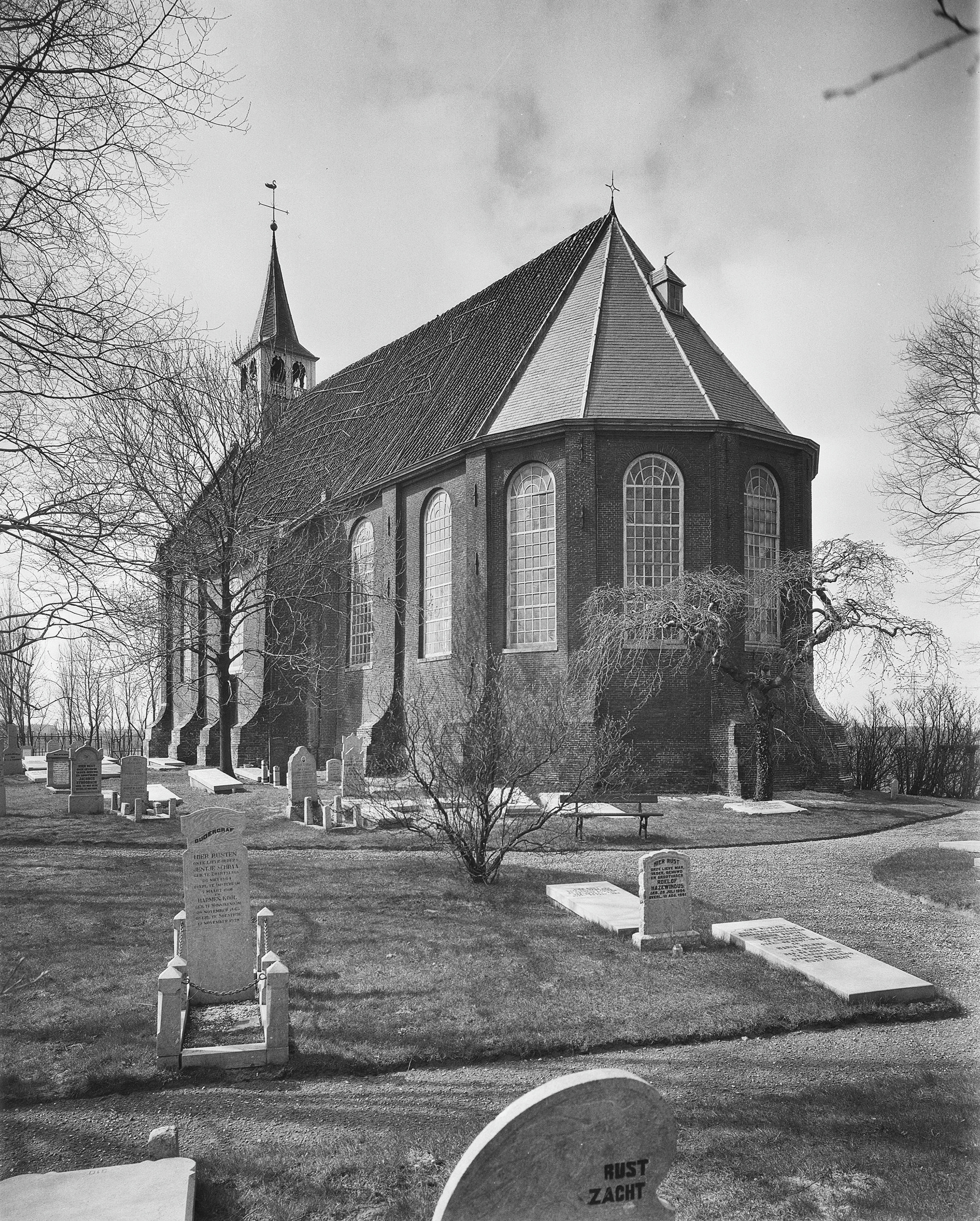 N.H.Kerk: exterieur naar het noord-westen